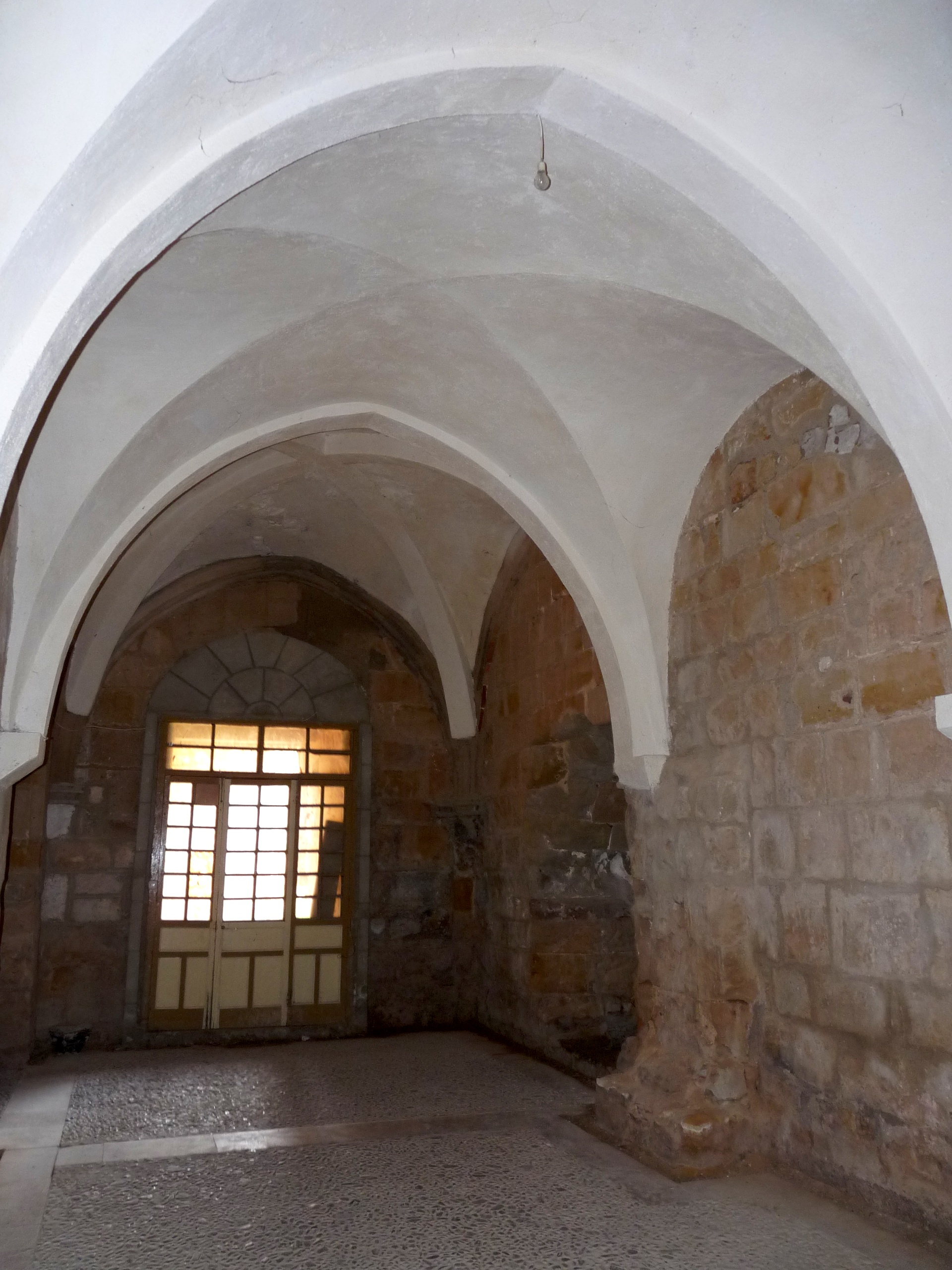 Monasterio de Santa María de Huerta - Parlatorium del cillero